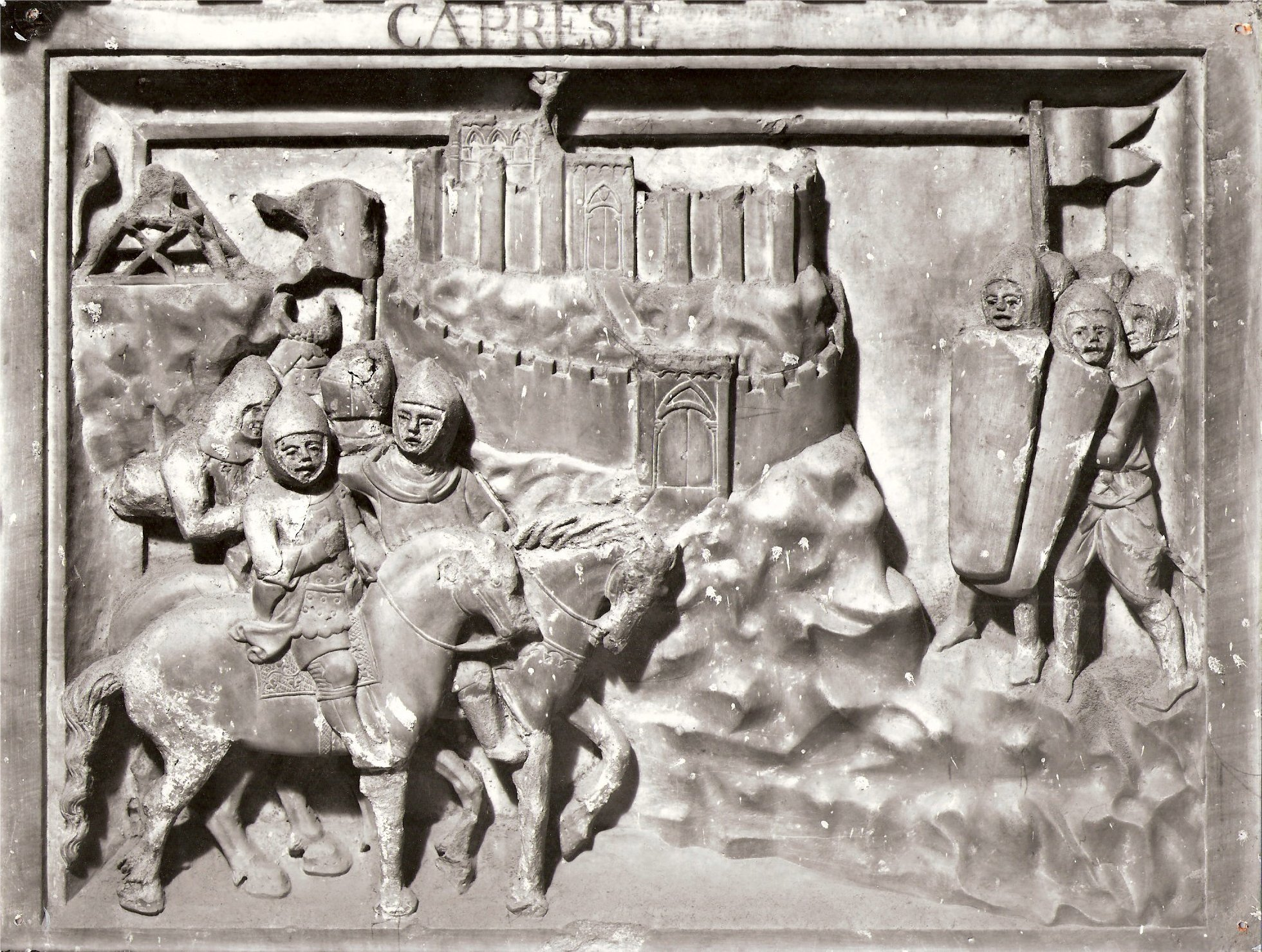 Agostino di Giovanni e Agnolo Ventura, Cenotafio di Guido Tarlati, particolare della formella di Caprese Michelangelo. Arezzo, Cattedrale di San Donato.